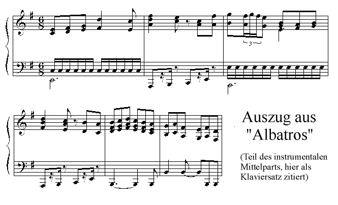 Beschreibung: kurzer Auszug (6 Takte) aus dem Instrumental-Mittelteil des Karat-Songs "Albatros" als Klavierarrangement. Lizenz des Notenbeispiels: Kurzauszug zitiert nach Zitatrecht. Karat, Notenbild editiert von Patrick Baumbach (Finale Note Pad) Fotograf / Zeichner: Patrick Baumbach.